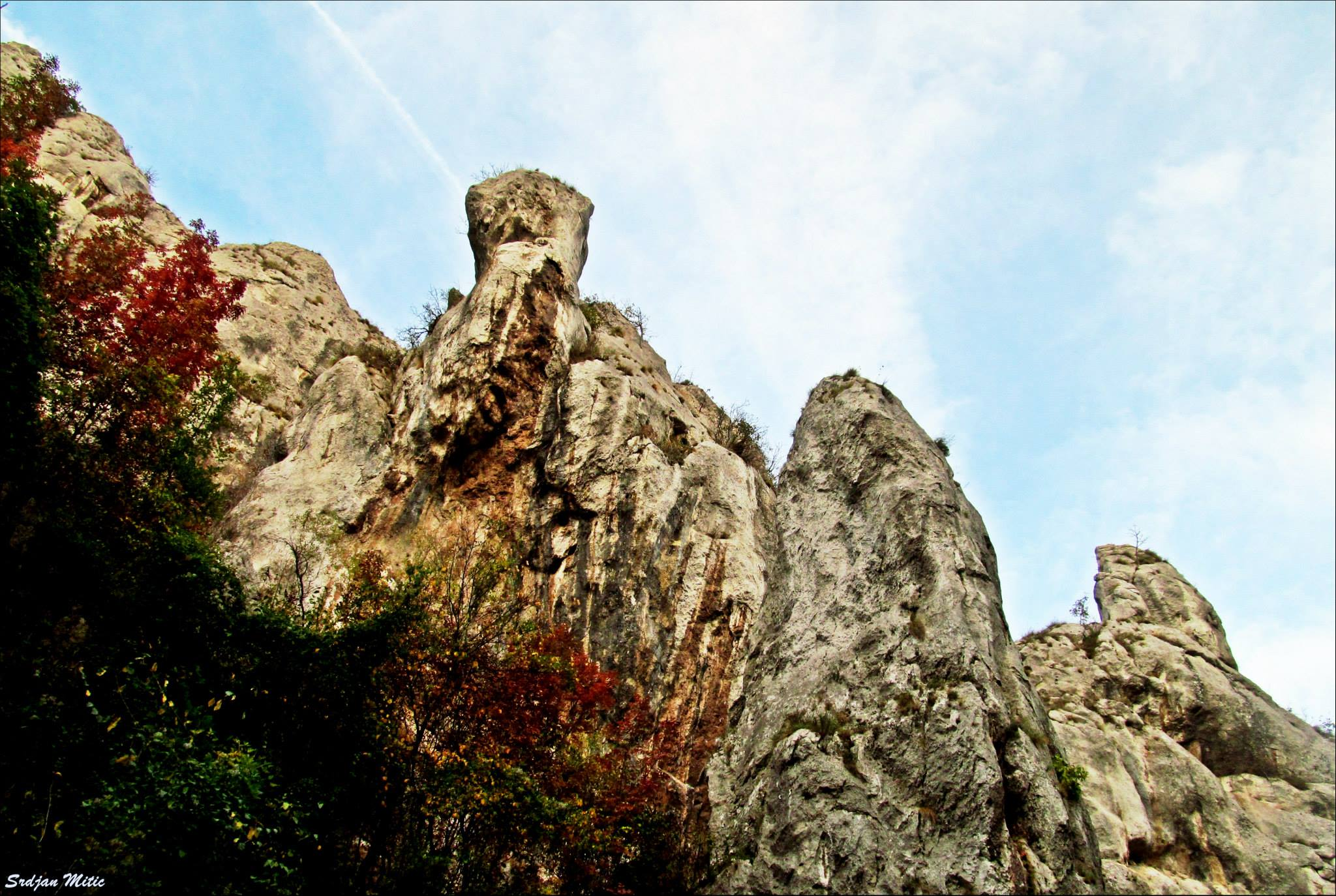 Српски (ћирилица): Јелашничка клисура, Нишка Бања, Србија. У Јелашничкој клисури, на њеним стрмим странама, богата морфолошка орнаментика распоређена је по одсецима који су „степенасто распоређени и воденом ерозијом разбијени на стеновите ртове, усамљене зупце, платна и стубове,“ што овој клисури даје веома атрактиван изглед.